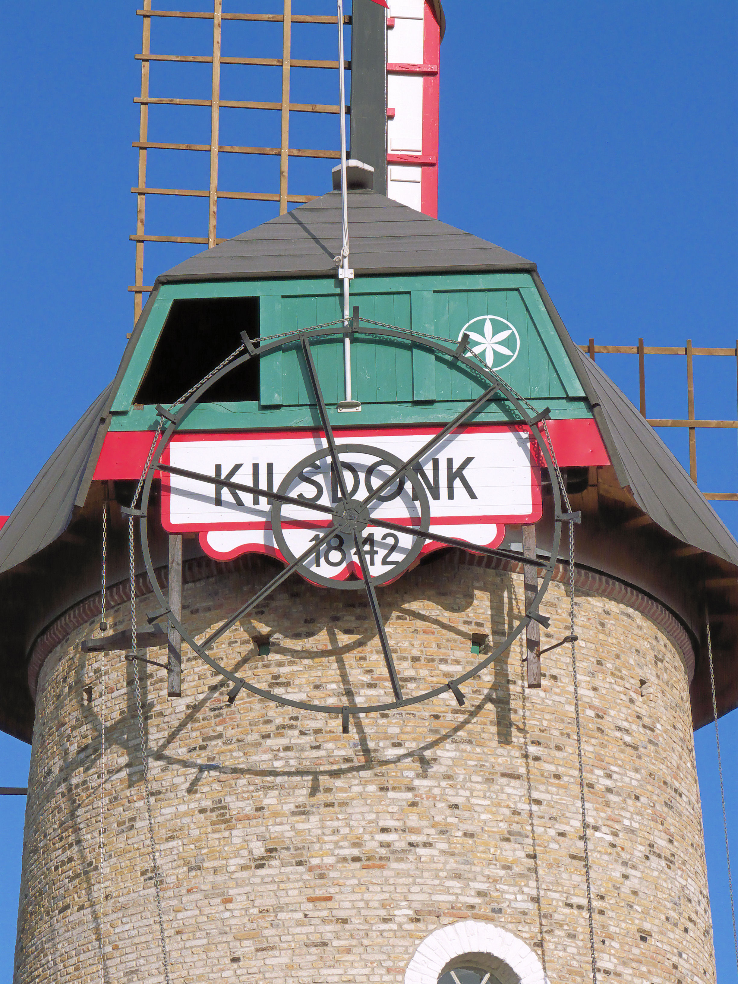 Kilsdonkse molen, Dinther, kettingkruiwerk gaffelwiel